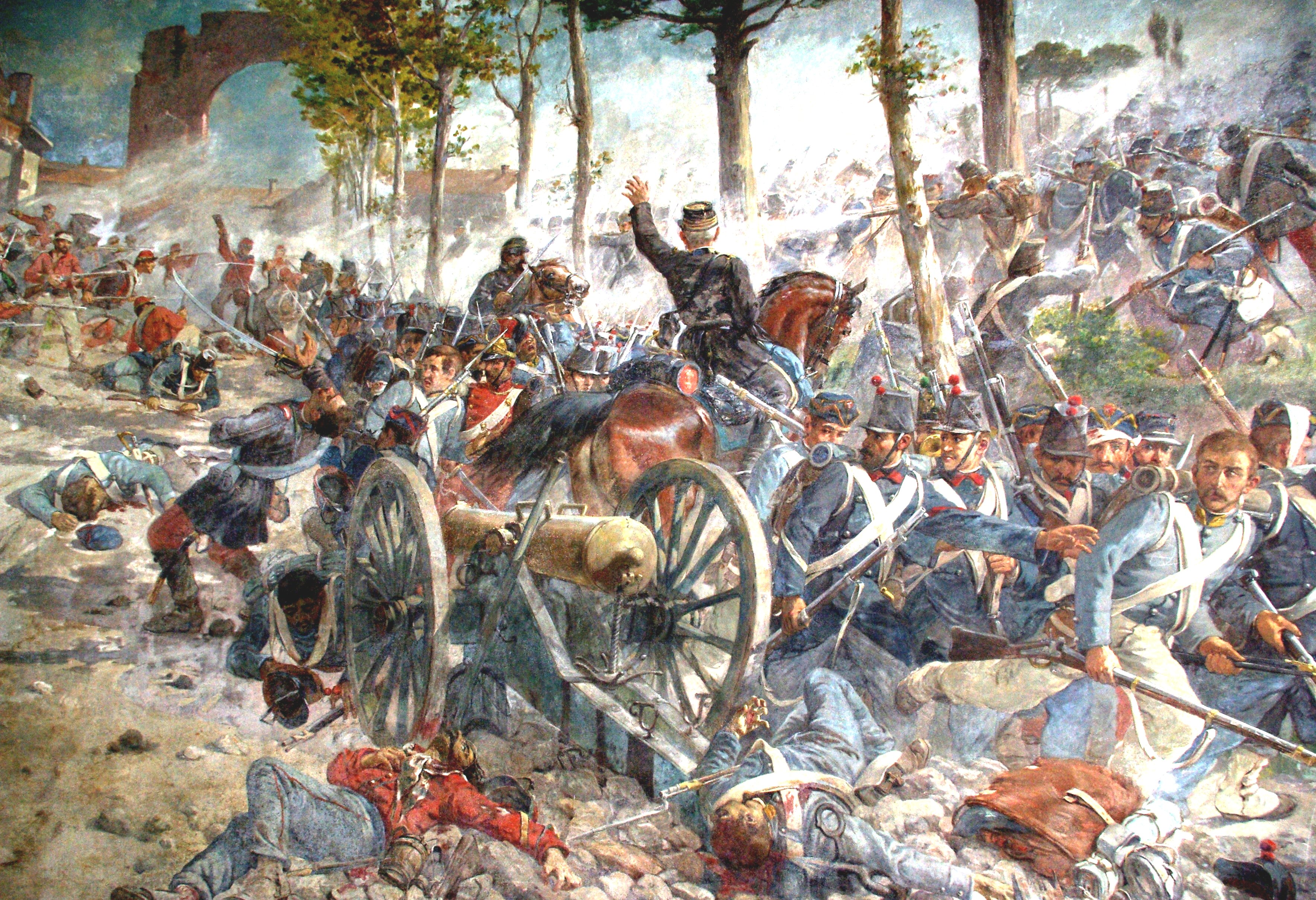 Ausschnitt eines Freskos im Turm von San Martino della Battaglia